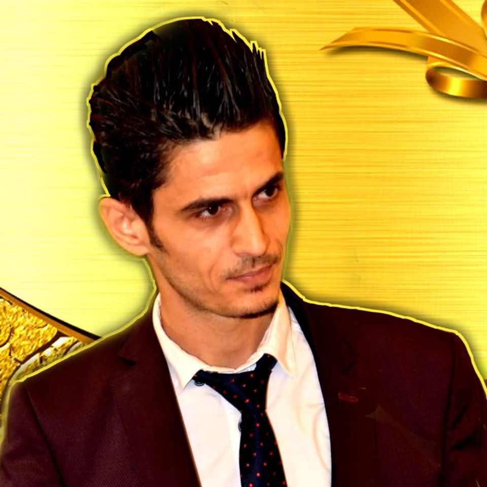 الفنان والخبير التقني محمد الأصيل من الجمهورية العربية السورية من مواليد مدينة الرقة